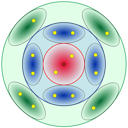 Struttura di Lewis del fosforo.